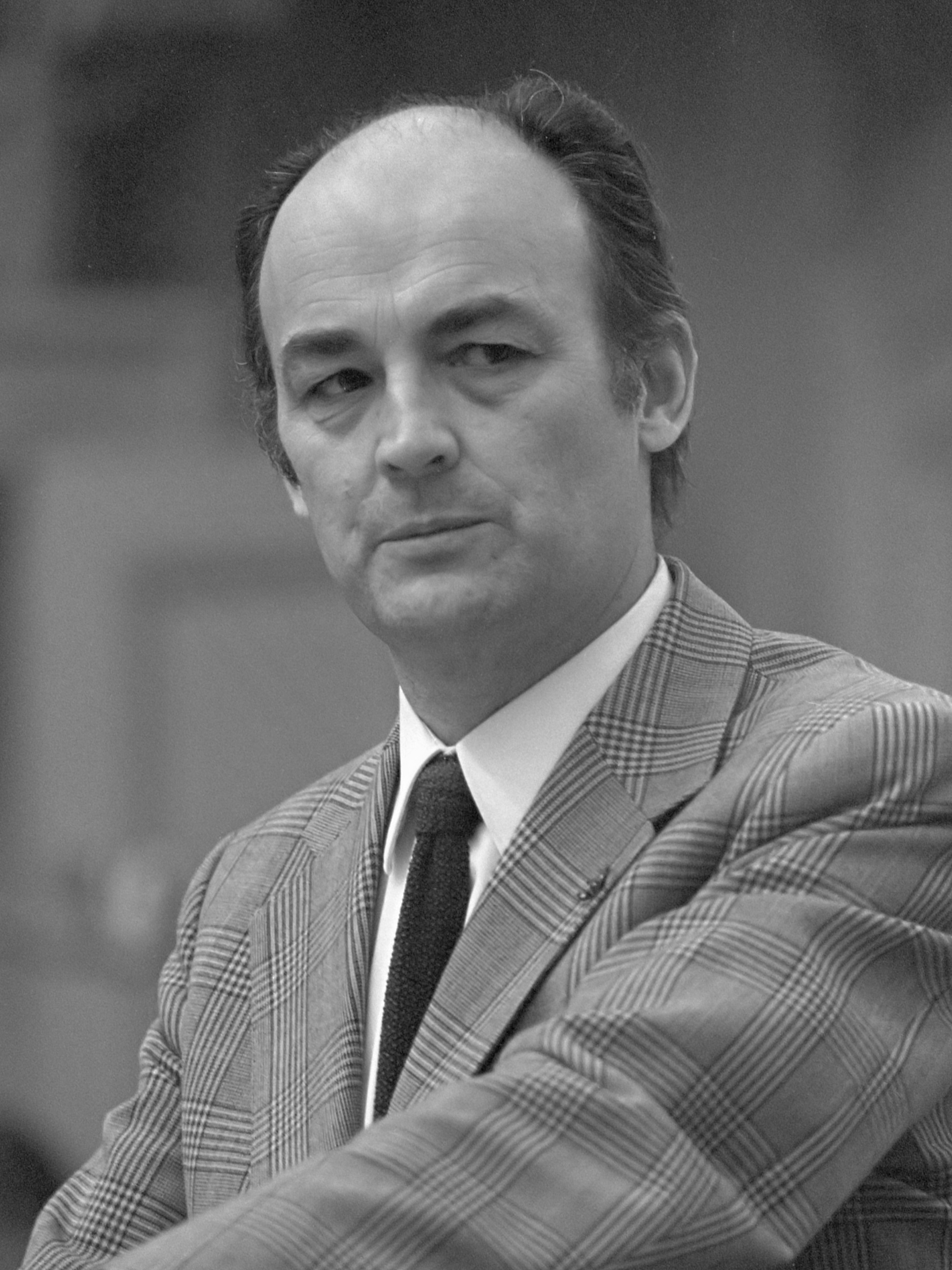 AR-fractieleider Aantjes gaat vragen stellen over benoeming Van der Louw tot burgemeester van Rotterdam, Aantjes in de Tweede Kamer 22 oktober 1974